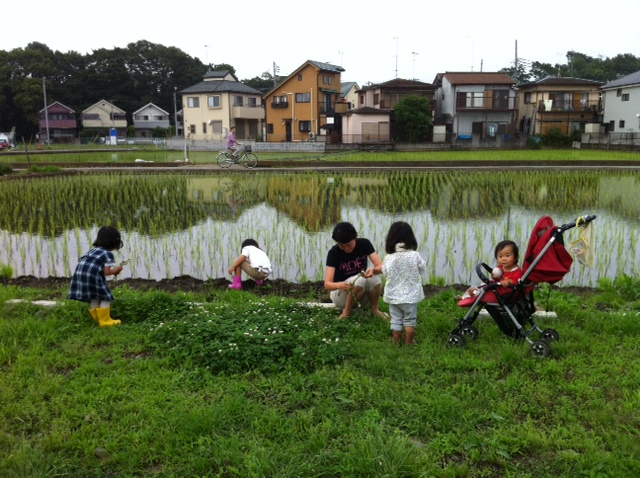 住宅を背景に水田や農地で遊ぶ地域住民の姿がある